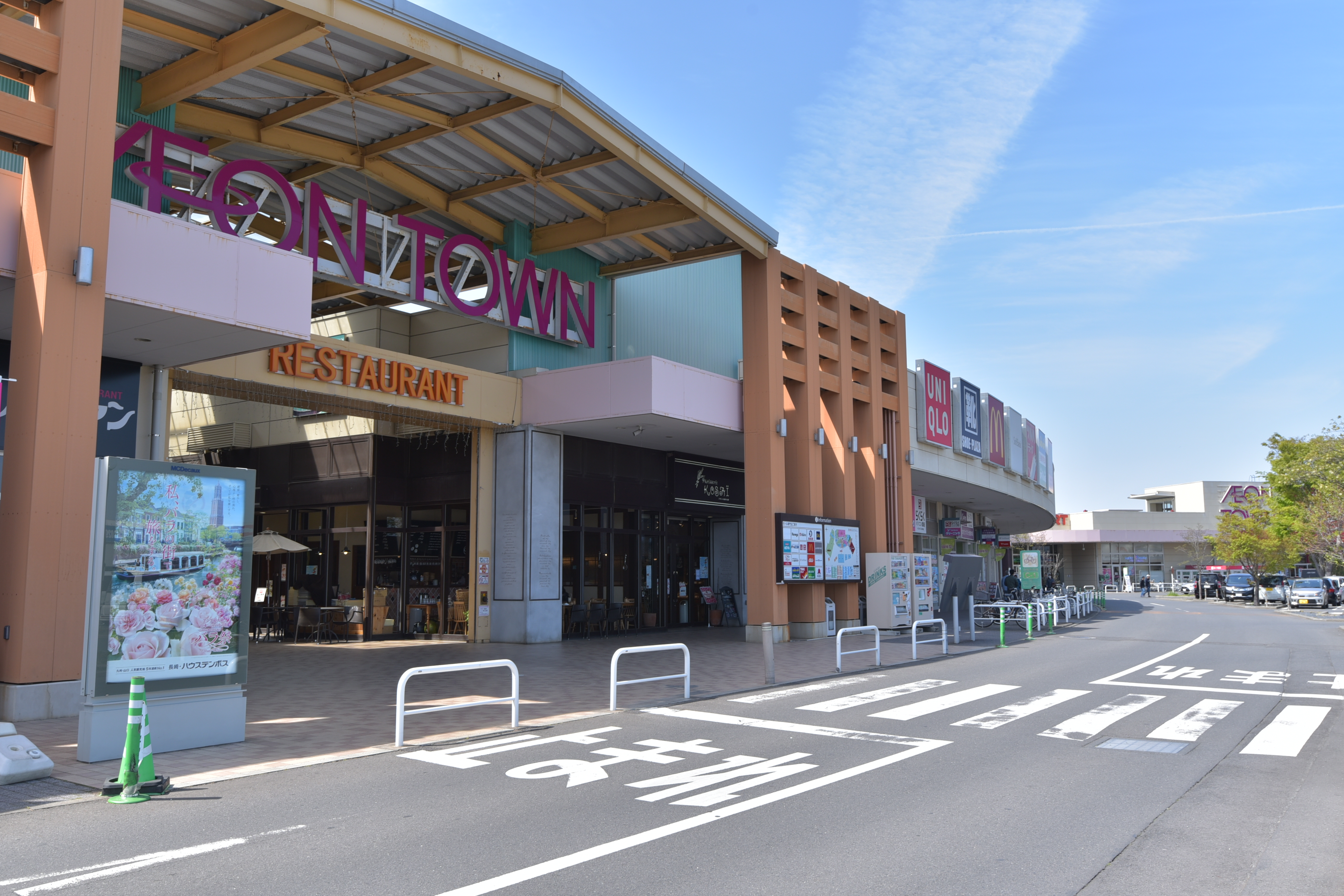 イオンタウン水戸南のメインエントランスにあたるレストラン街入口 Nikon D750